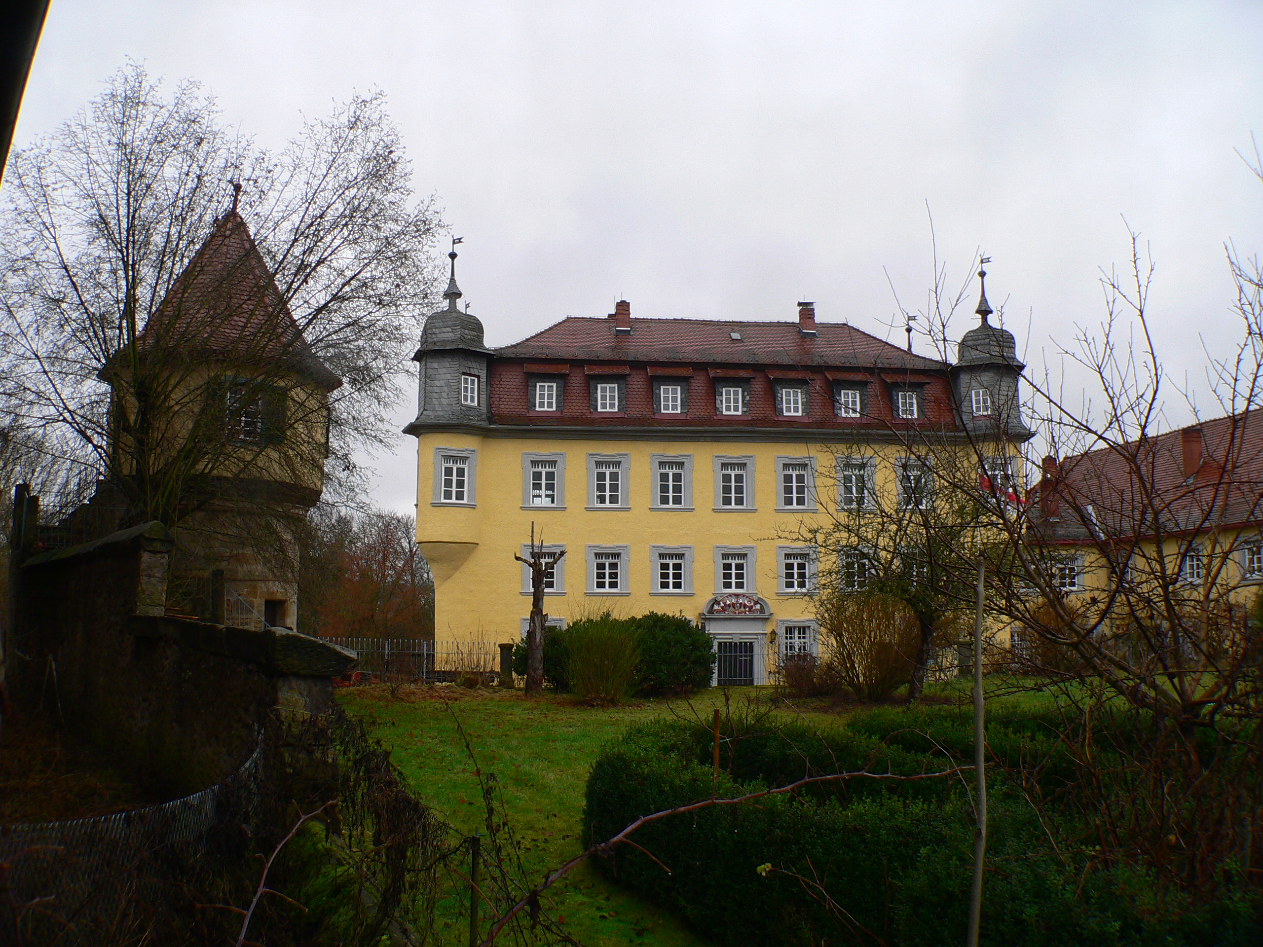 Hinteres (Neues) Schloss in Küps, Bayern, Regierungsbezirk Oberfranken, Landkreis Kronach – Hauptflügel